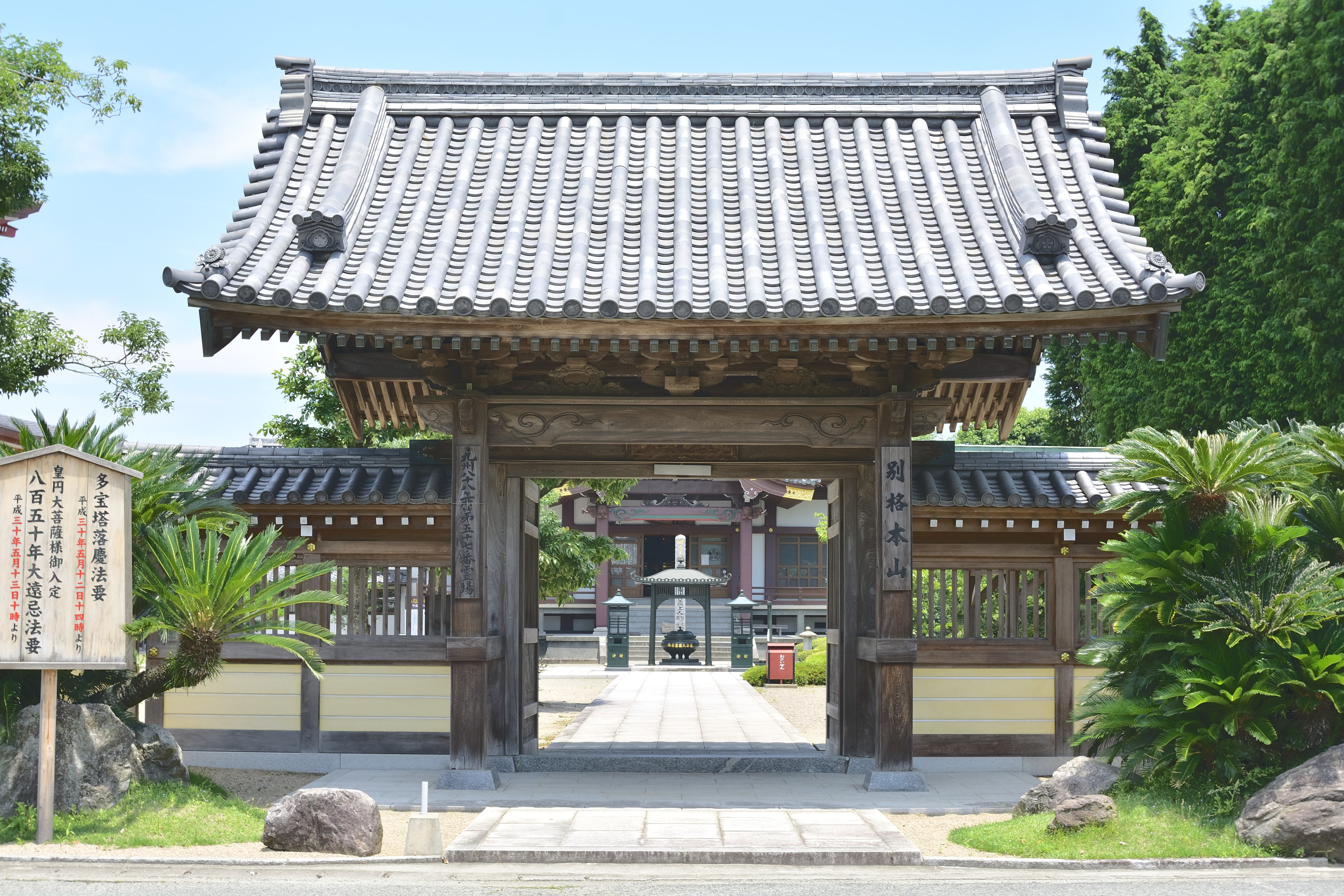 蓮華院誕生寺の延命門